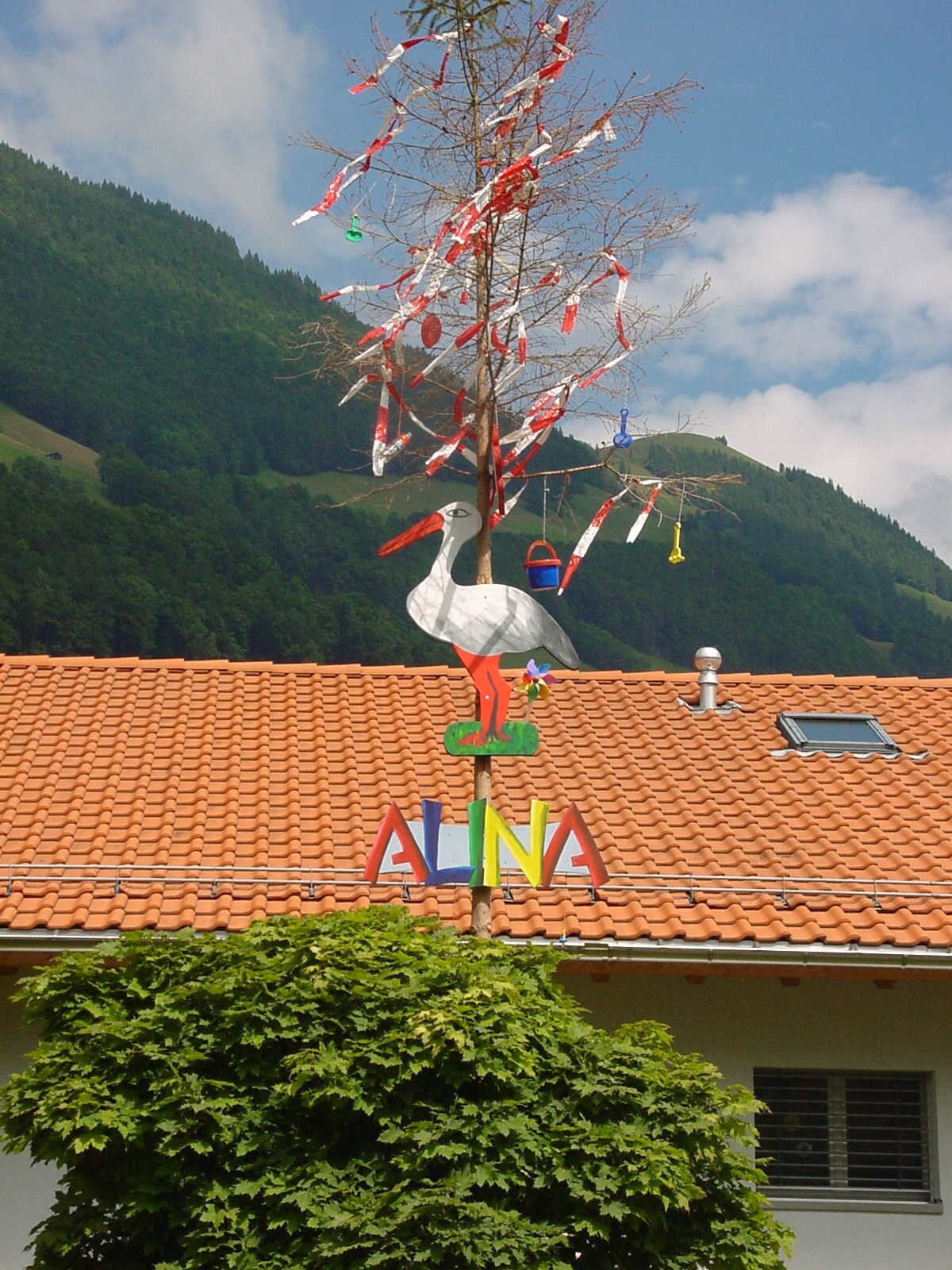 Geburtsbekanntmachung am Lungernersee